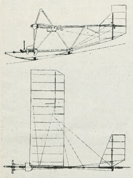 Rzuty szybowca CWJ